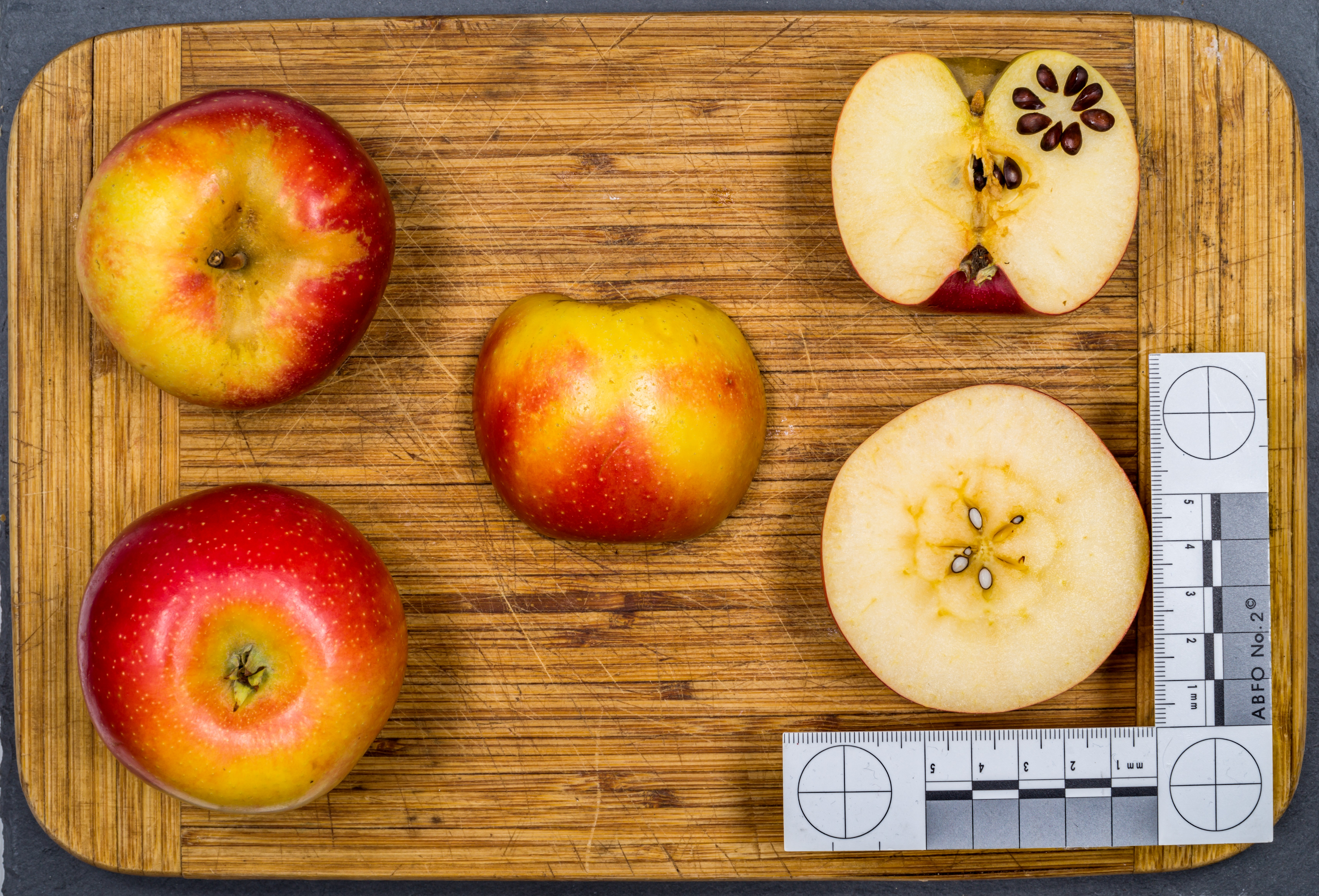 Apfelsorte: Ariane, Clubsorte, 1979 am INRA, (Florina × Prima) × Golden Delicious